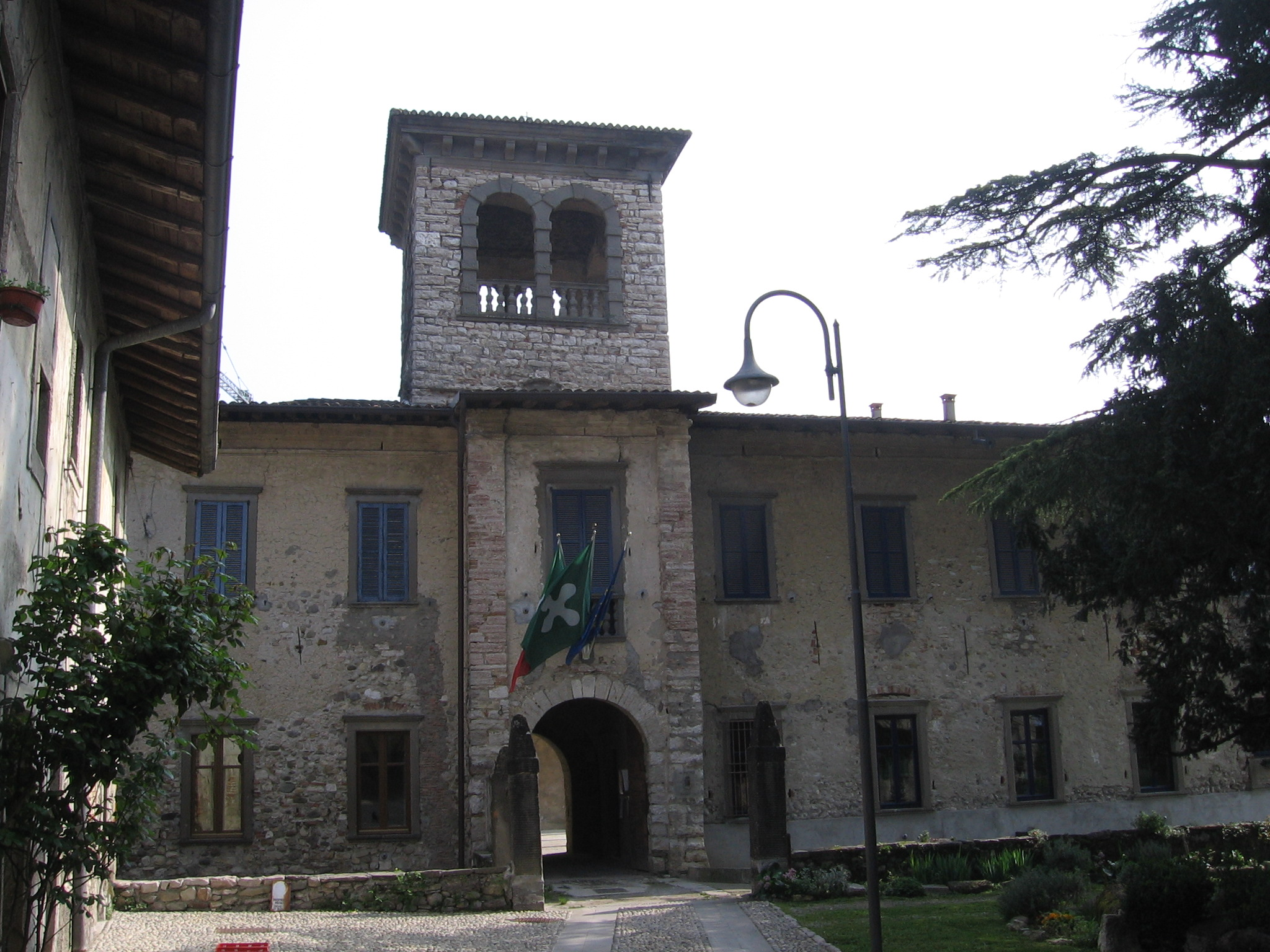 Castello dei Giovannelli a Luzzana, Bergamo, Italia